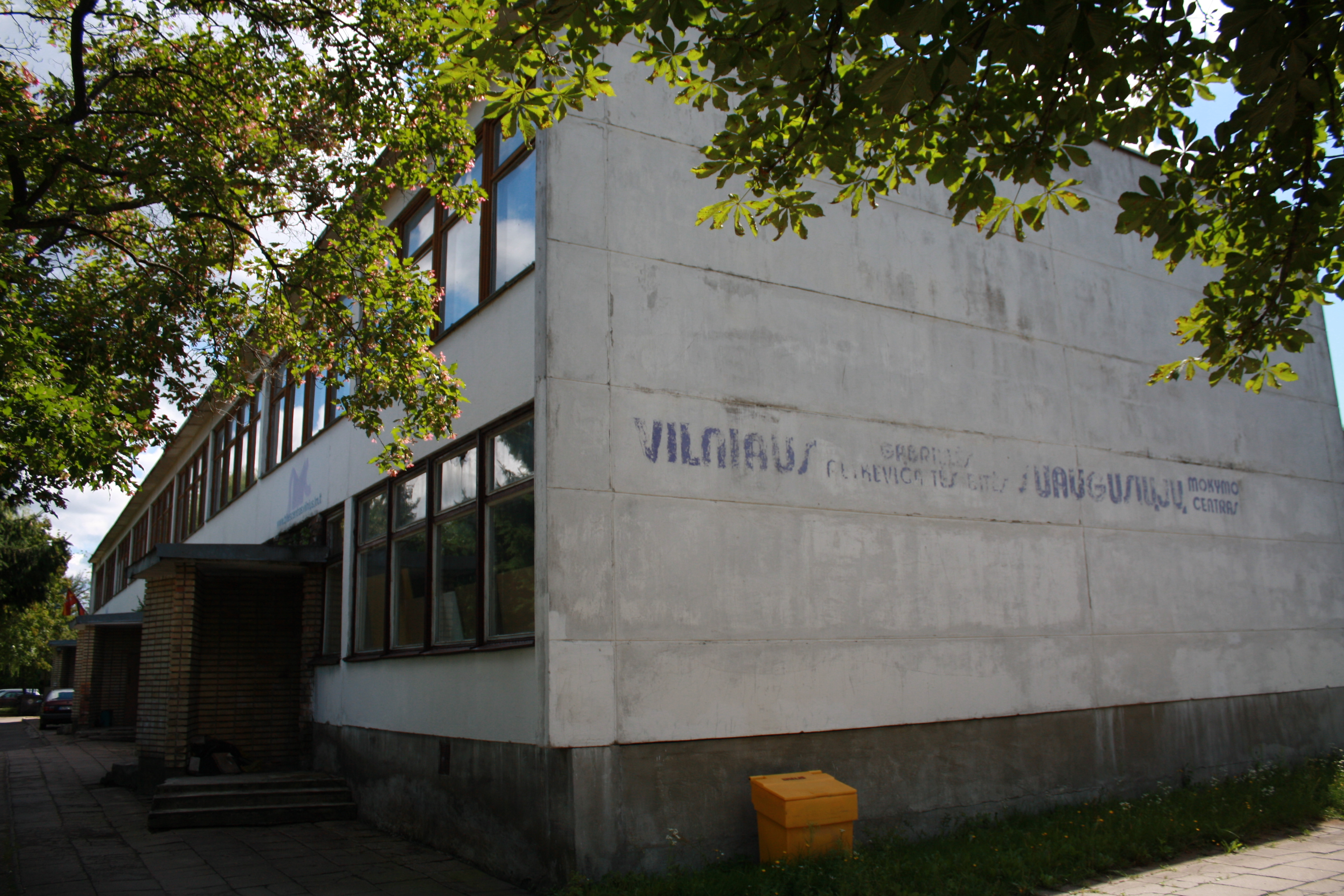 Vilniaus Gabrielės Petkevičaitės-Bitės suaugusiųjų mokymo centras